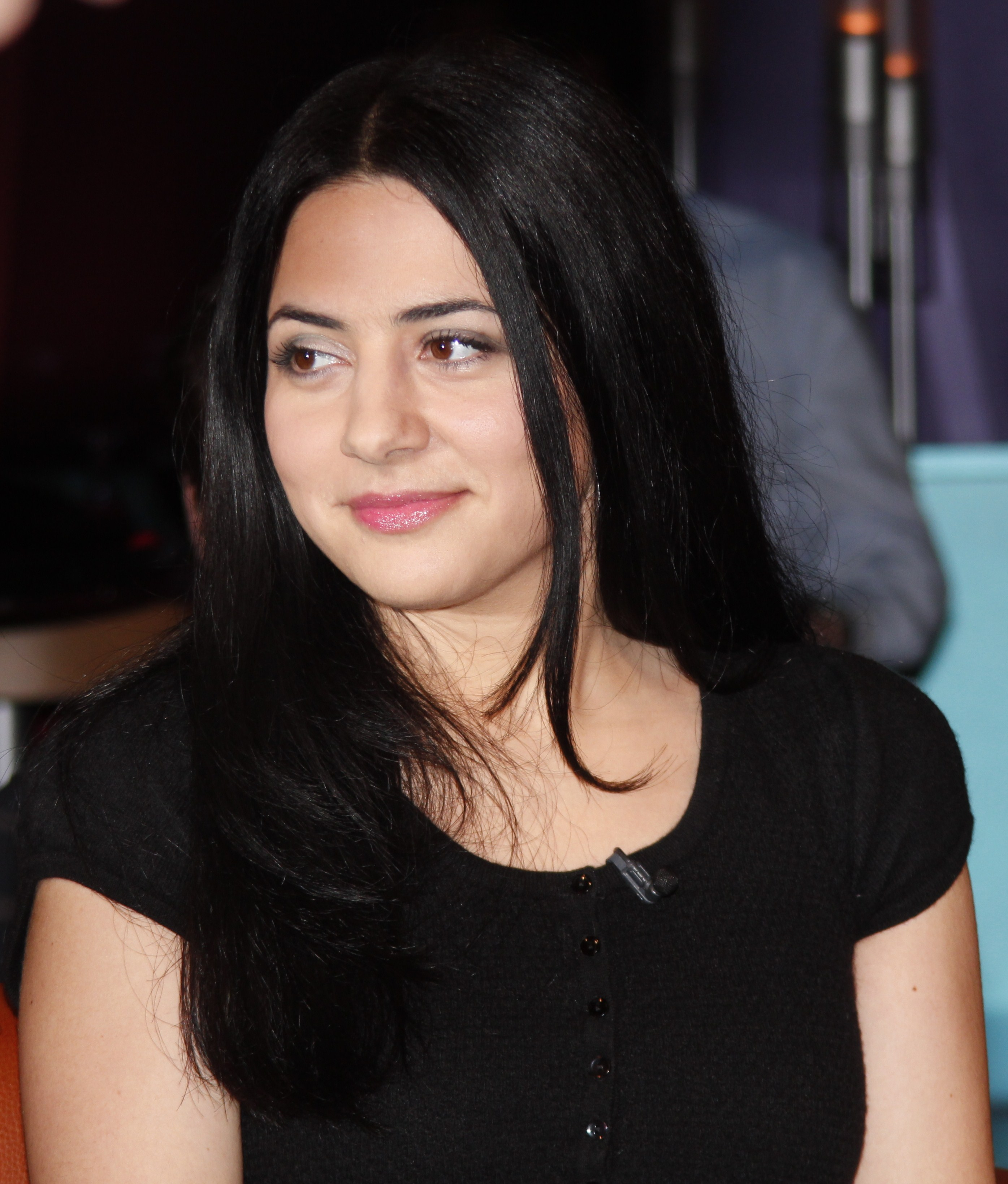 Nesrin Şamdereli (* 1979 in Dortmund) ist eine deutsch-türkische Drehbuchautorin